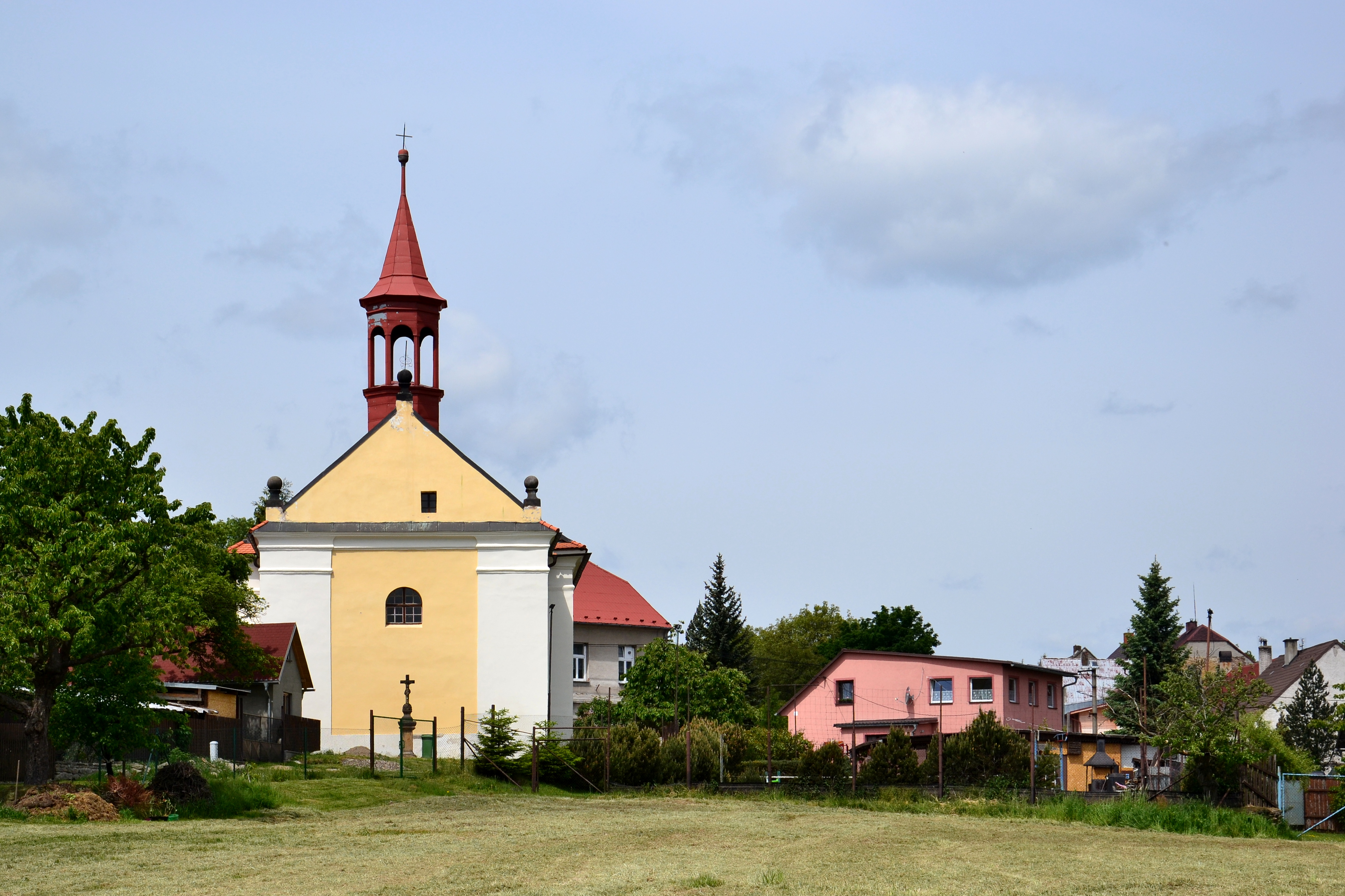 Kostel Nejsvětější Trojice od hřbitova